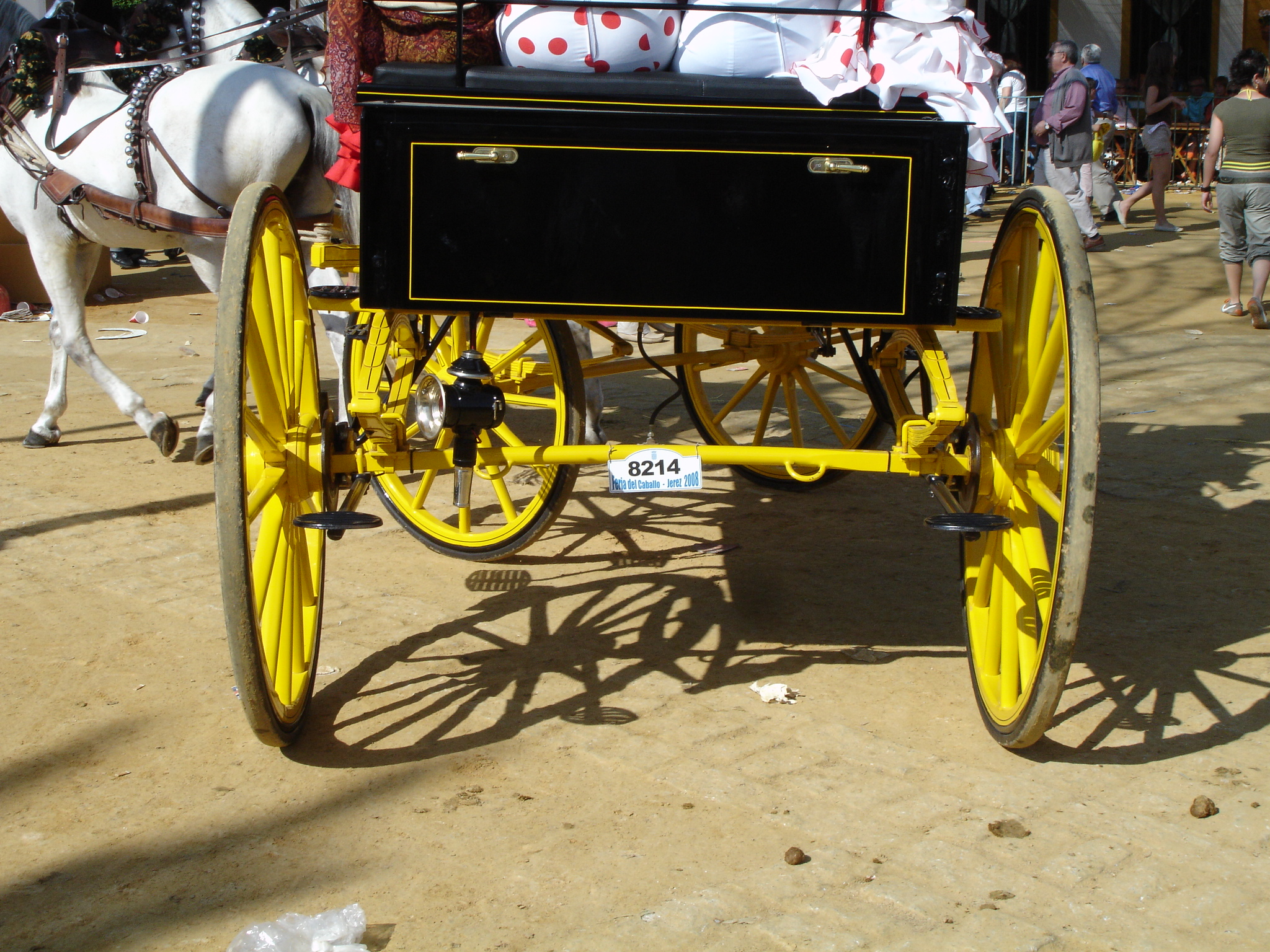 Feria del Caballo 2008. Jerez de la Frontera, Andalusia (Spain)